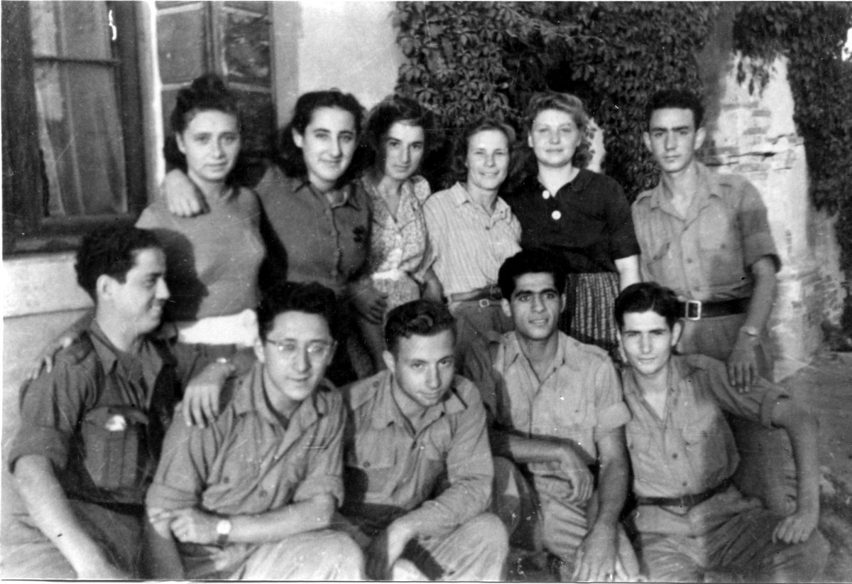 אימוני הפלמ"ח לבני הנוער החלוצי באירופה - נוננטולה(איטליה): וילה אמה מיאר-חוותהכשרה חקלאית ומחסן דלק וציוד לאניות מעפילים 1945-6 - חברי ההכשרה